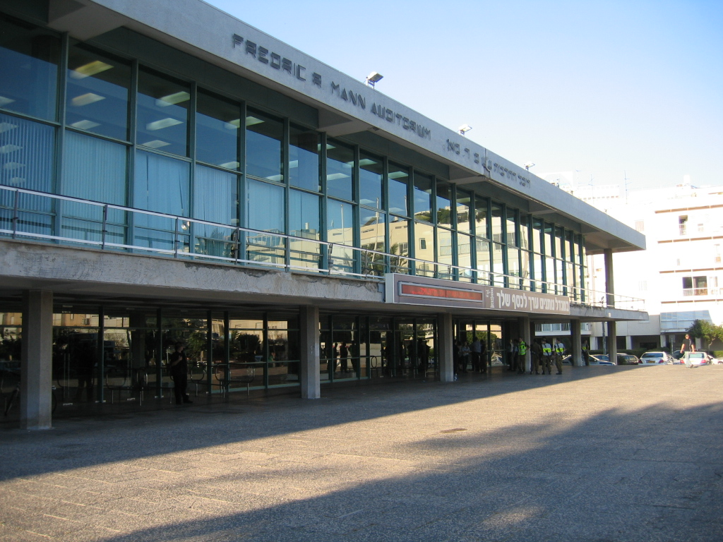 Fredric R. Mann Auditorum in Tel aviv היכל התרבות בתל אביב